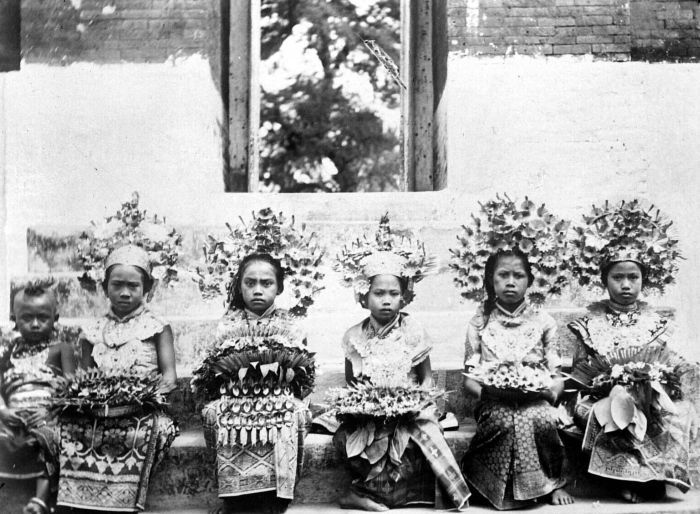 Repronegatief. Fraai aangeklede tempelmeisjes die sirih aanbieden voor de tempelpoort